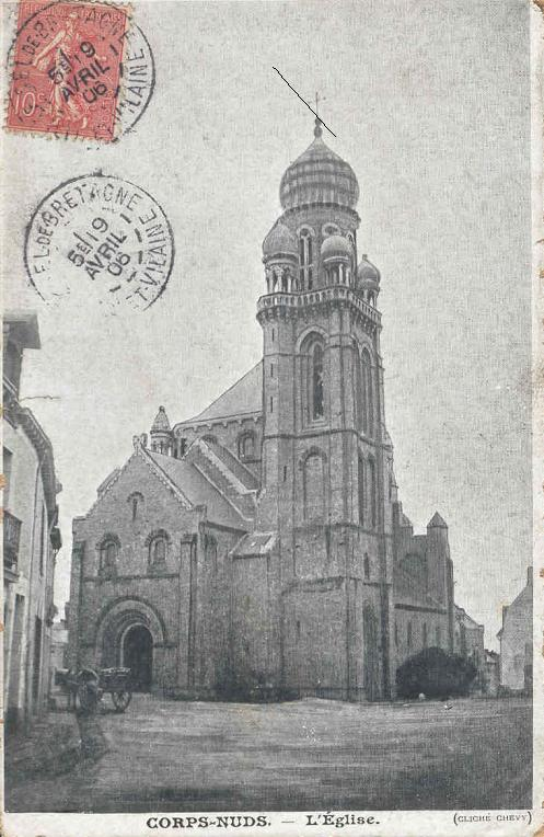 Carte postale de l'église Saint-Pierre (Saint Maximilien Kolbe depuis 2011) de Corps-Nuds, Ille-et-Vilaine, France (expédiée 1906)